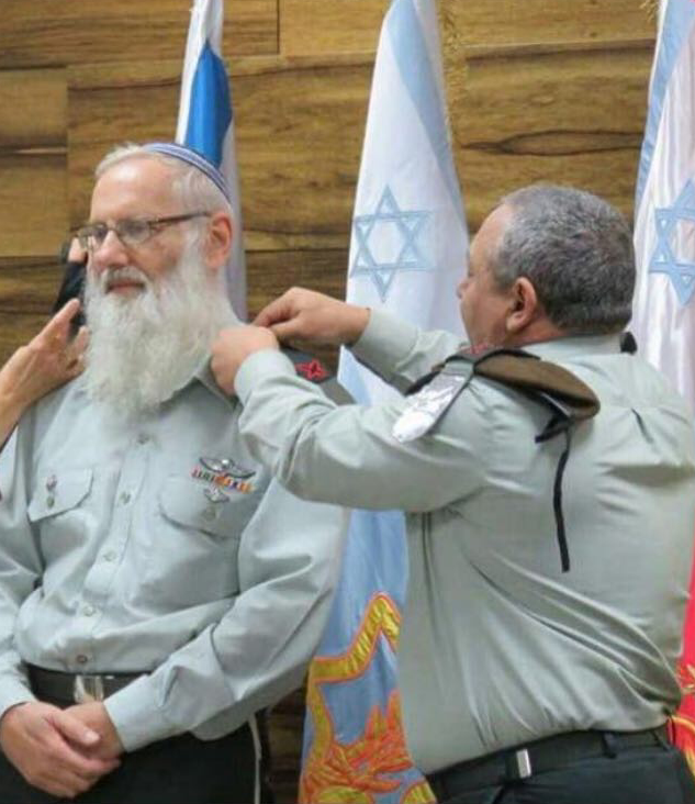 אייל קרים בטקס הענקת דרגת תת-אלוף מידי הרמטכ"ל גדי איזנקוט.